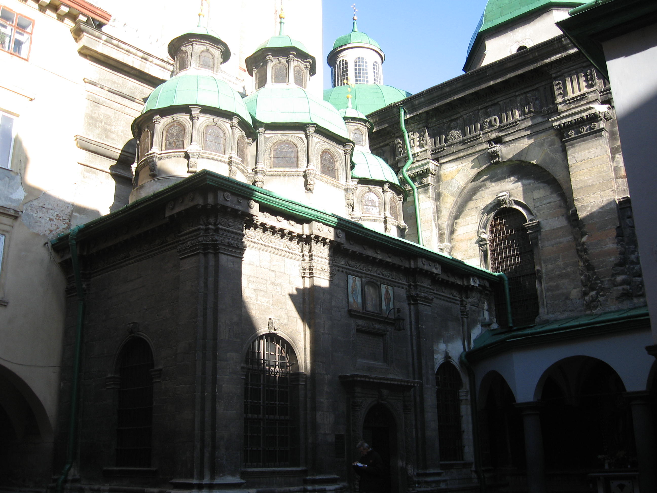 Часовня трех святителей в комплексе Успенской церкви, Львов